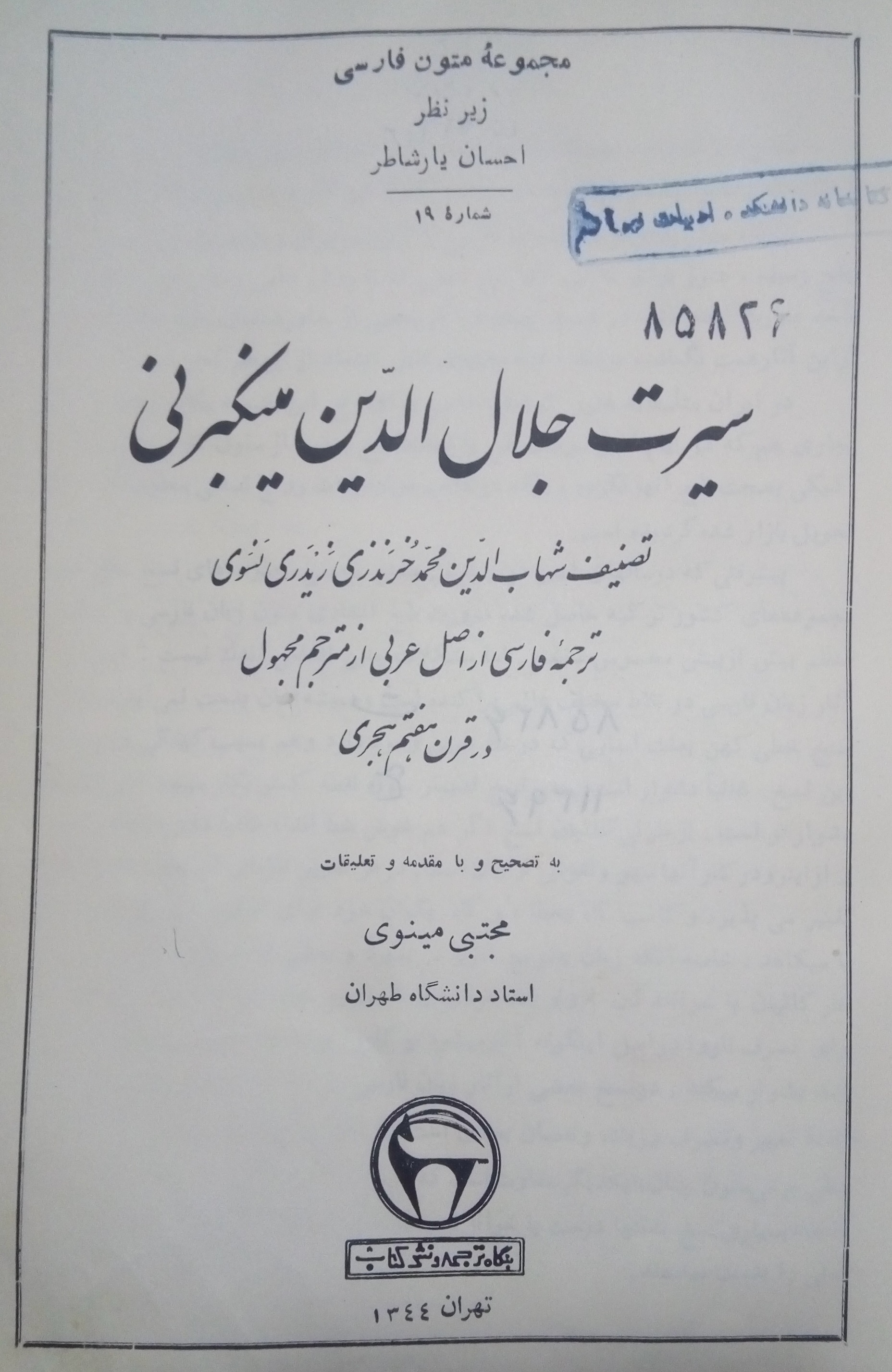 تصویر کتاب سیرت جلال الدین مینکبرنی